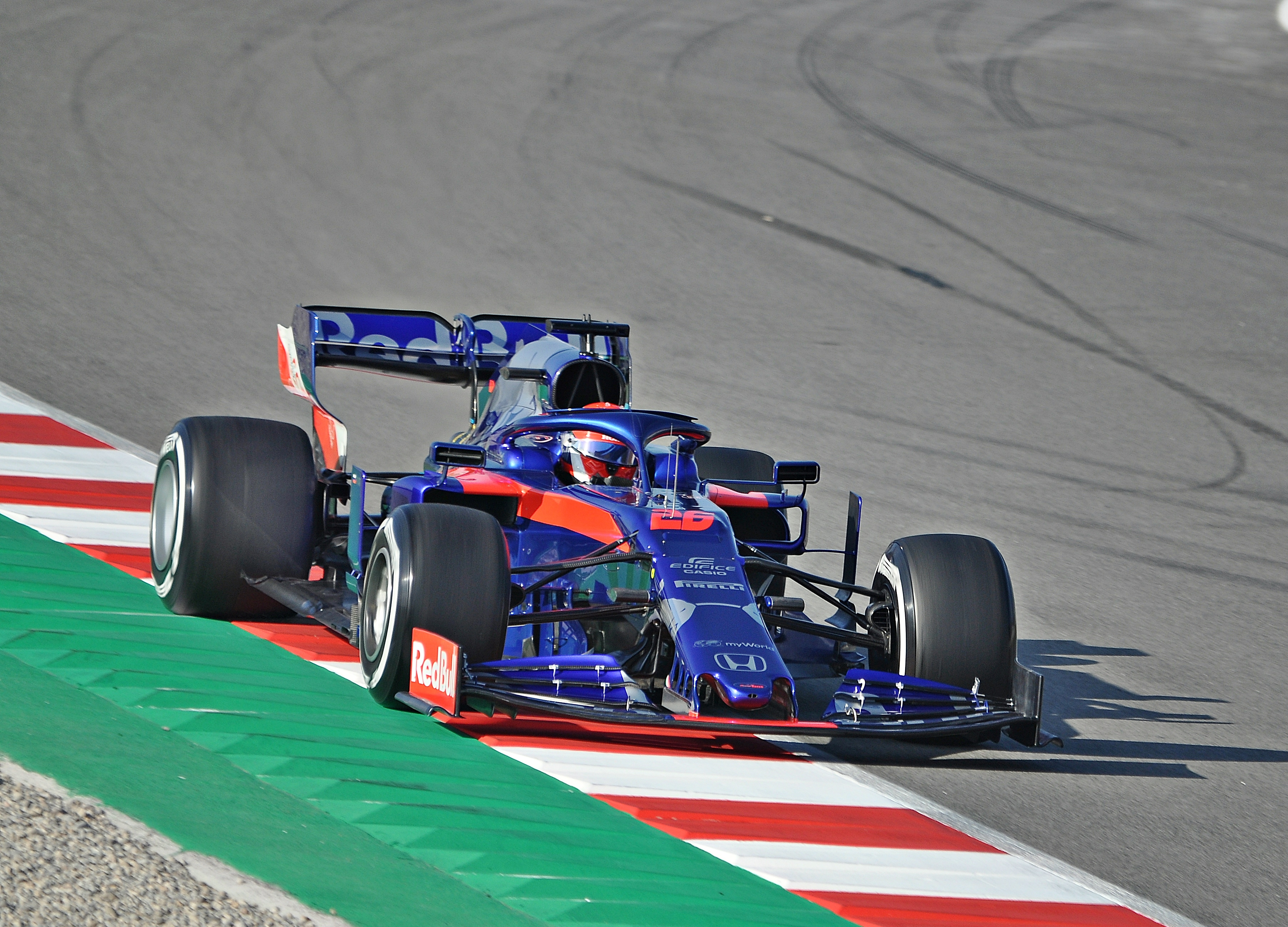 Test Days-Circuito de Catalunya